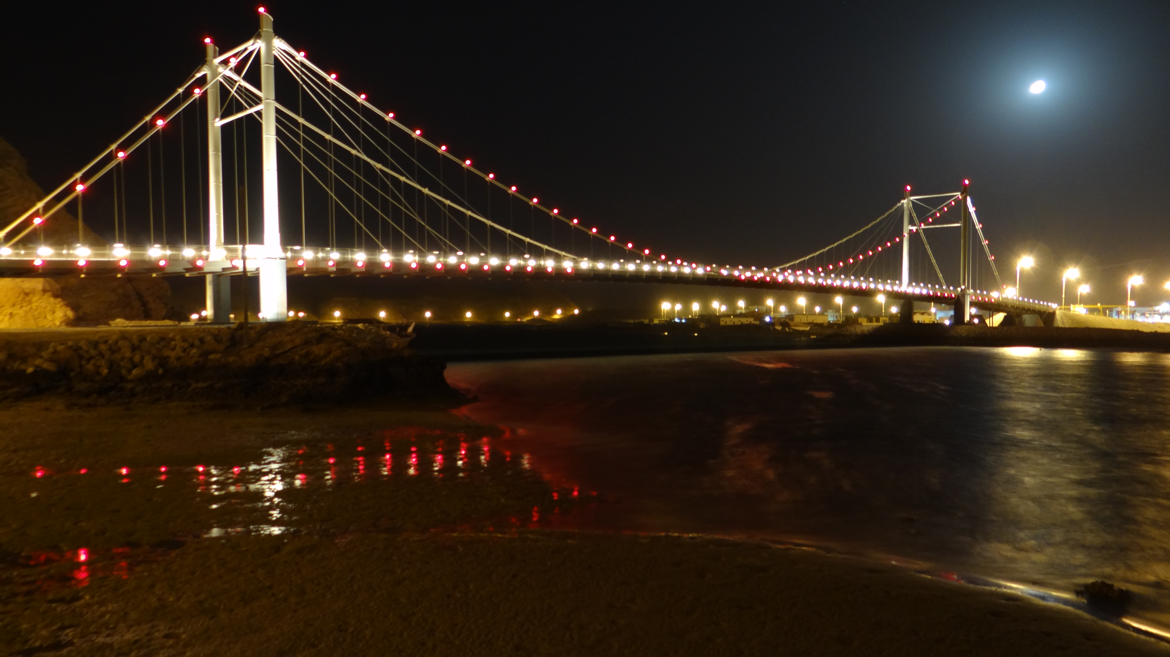 صورة ليلية لجسر العيجة المعلق في ولاية صور ، سلطنة عمان